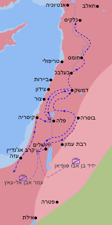 מפת הקרבות בכיבוש המוסלמי של סוריה וארץ ישראל עד לקרב הירמוך